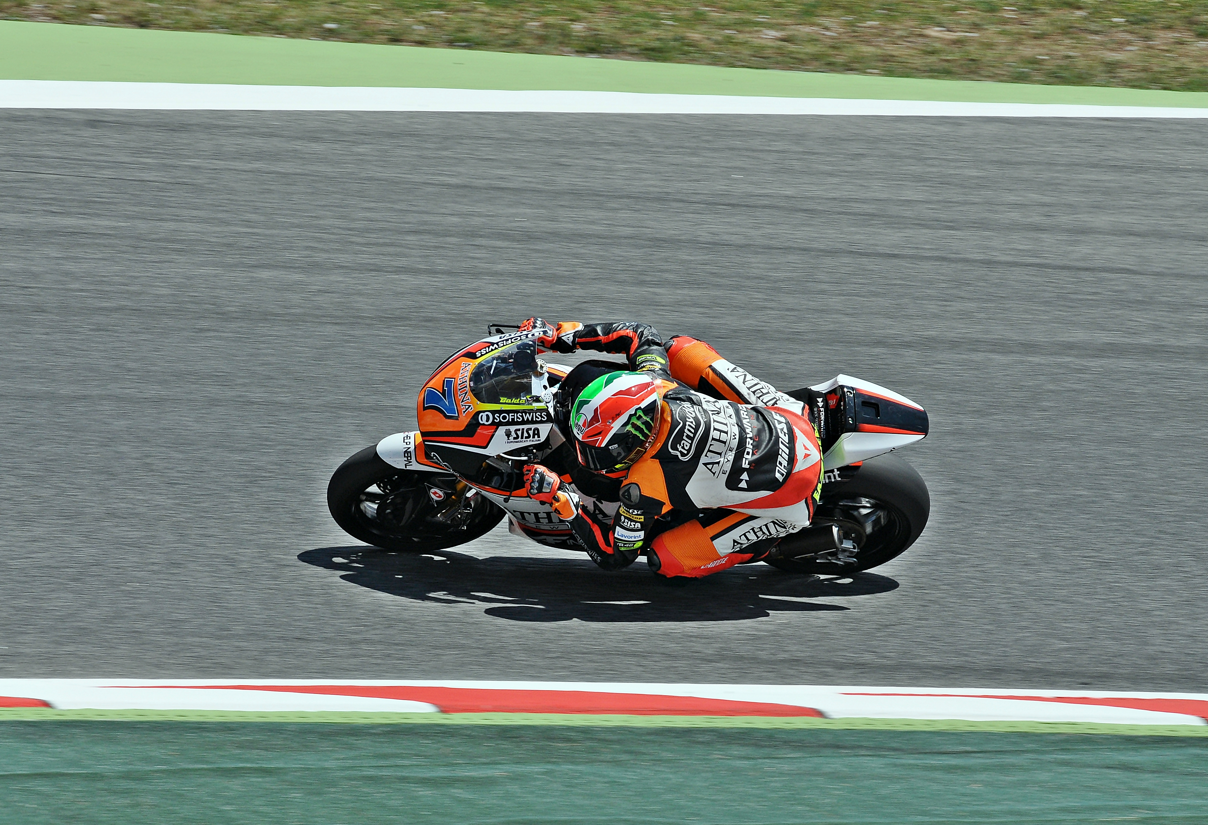 gran premio de cataluña